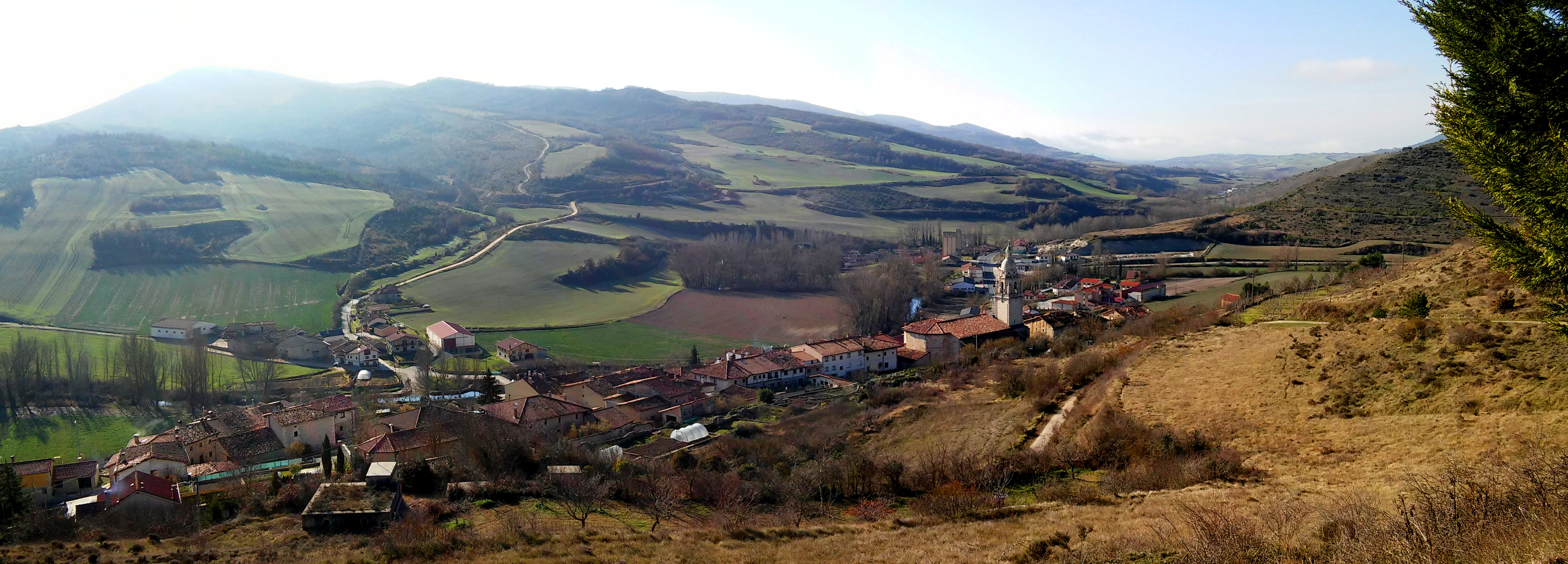 Trebiñu hilerritik